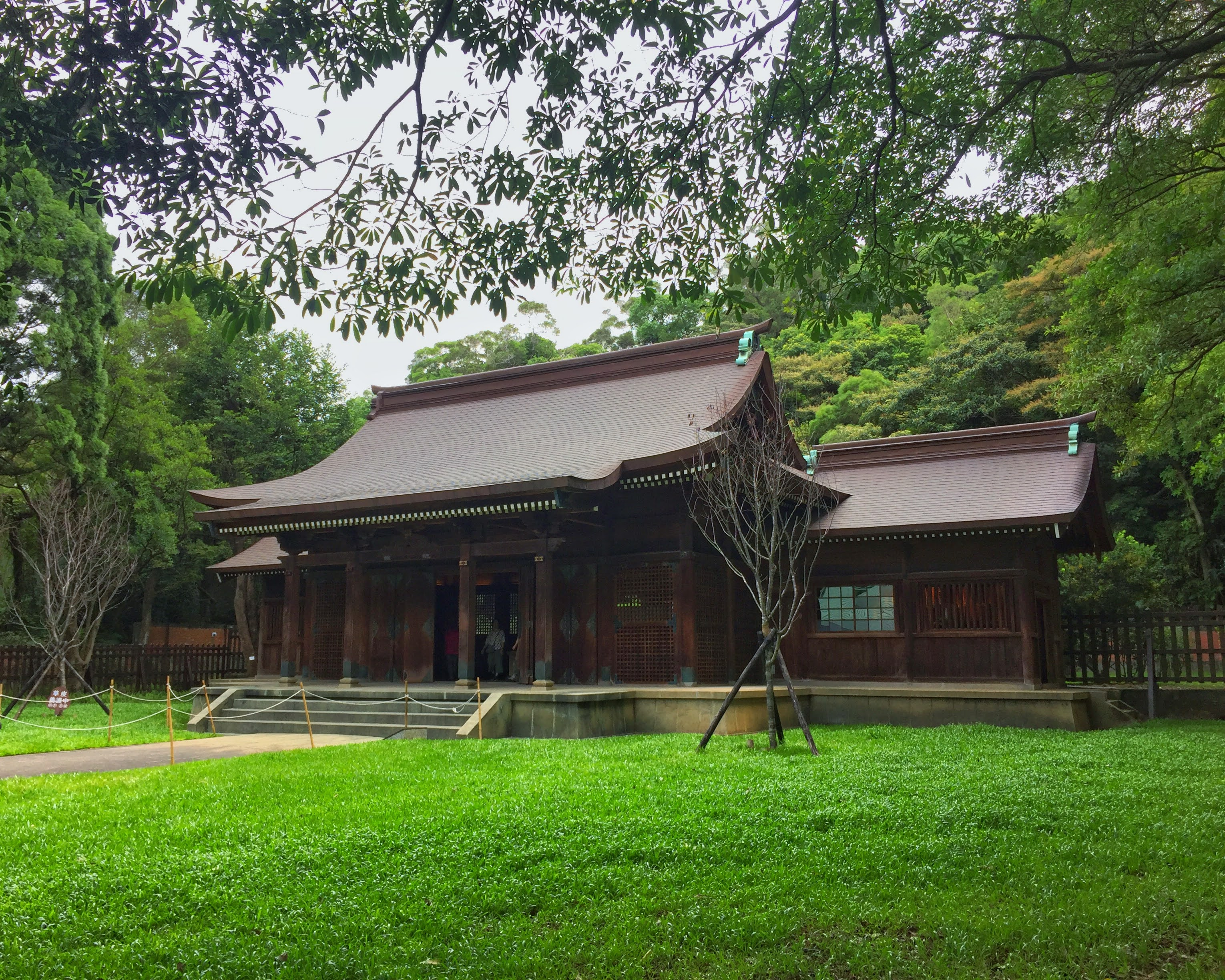 Taoyuan Shinto-helligdoms bønnerom (Haiden/拝殿). Forsida